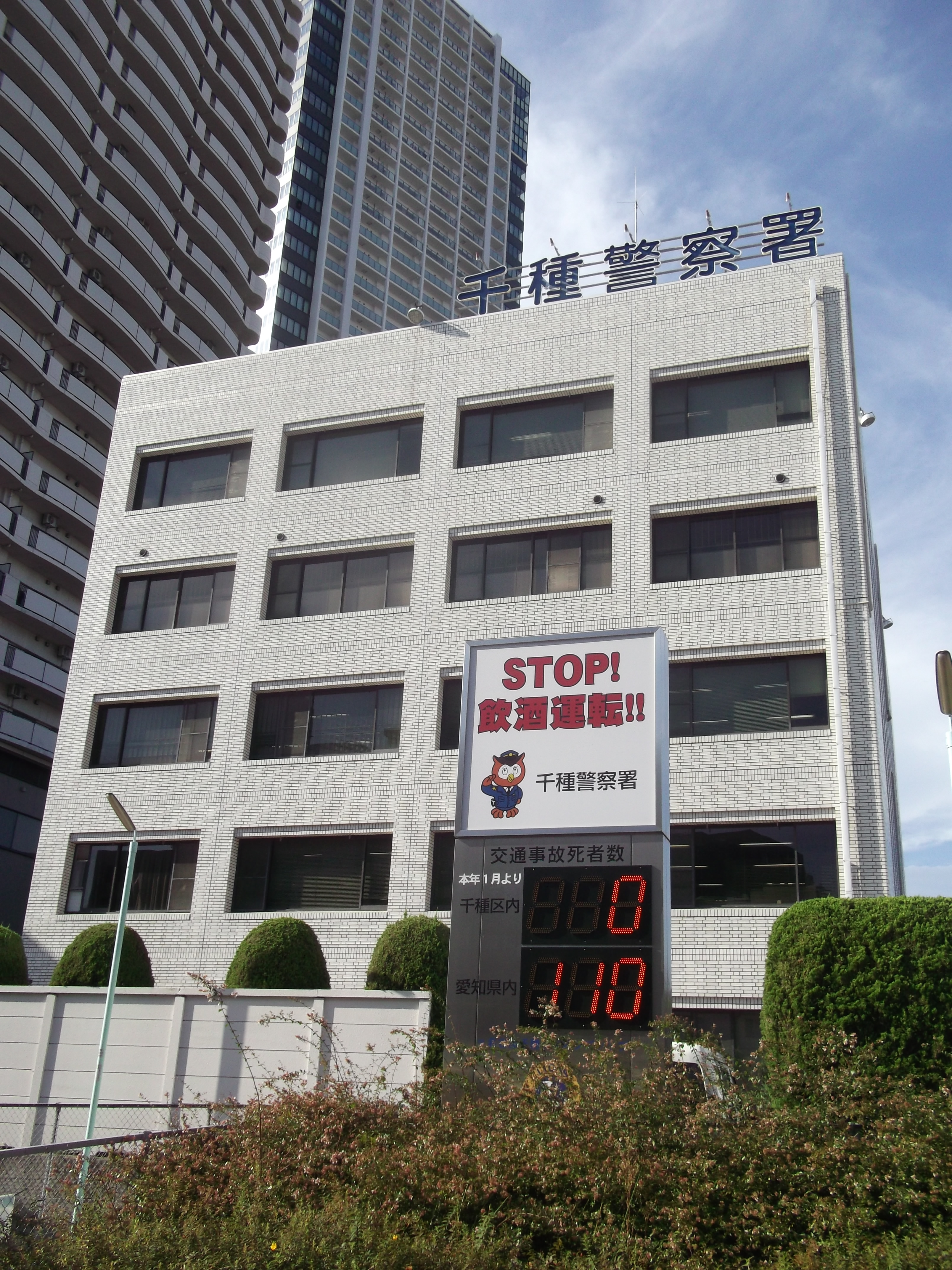 名古屋市千種区の愛知県警千種警察署を南側公道より撮影